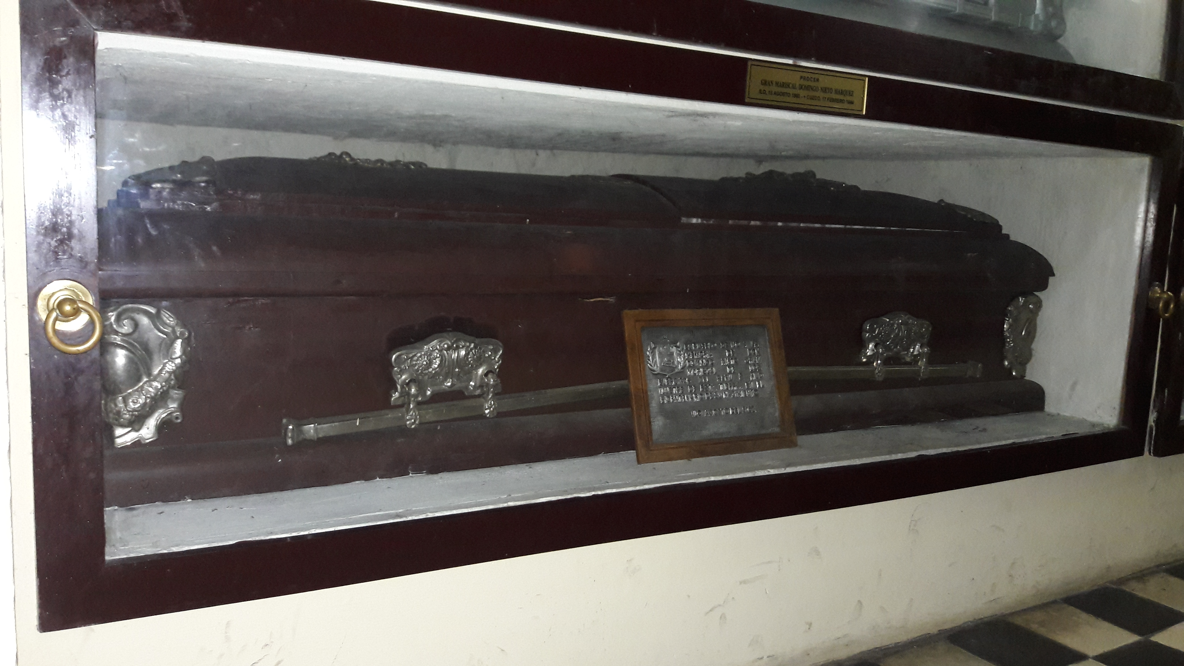 Tumba de Domingo Nieto